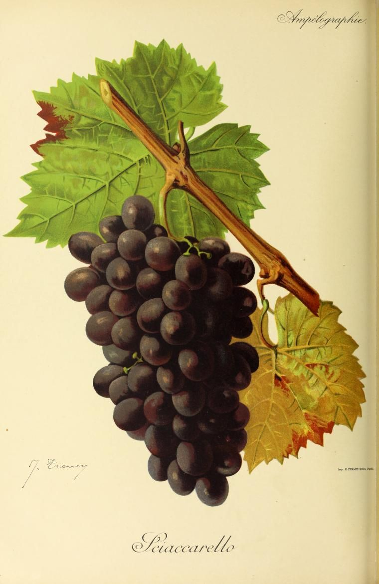 Illustration du cépage Sciaccarello par Jules Troncy dans l'ouvrage "Ampélographie : traité général de viticulture" publié sous la direction de P. Viala & V. Vermorel avec la collaboration de A. Bacon, A. Barbier, A. Berget [et al.] - Date de l'édition originale : 1901-1910